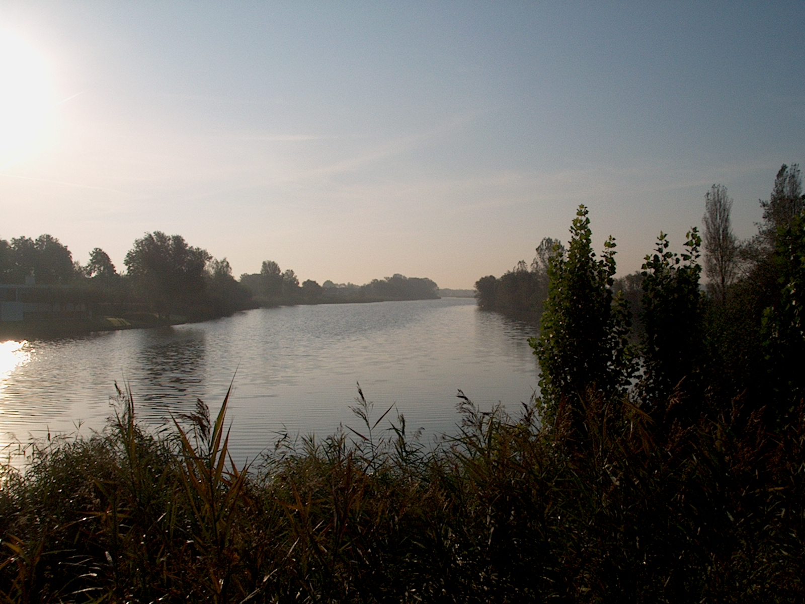 photo: Iwan Sjokotov